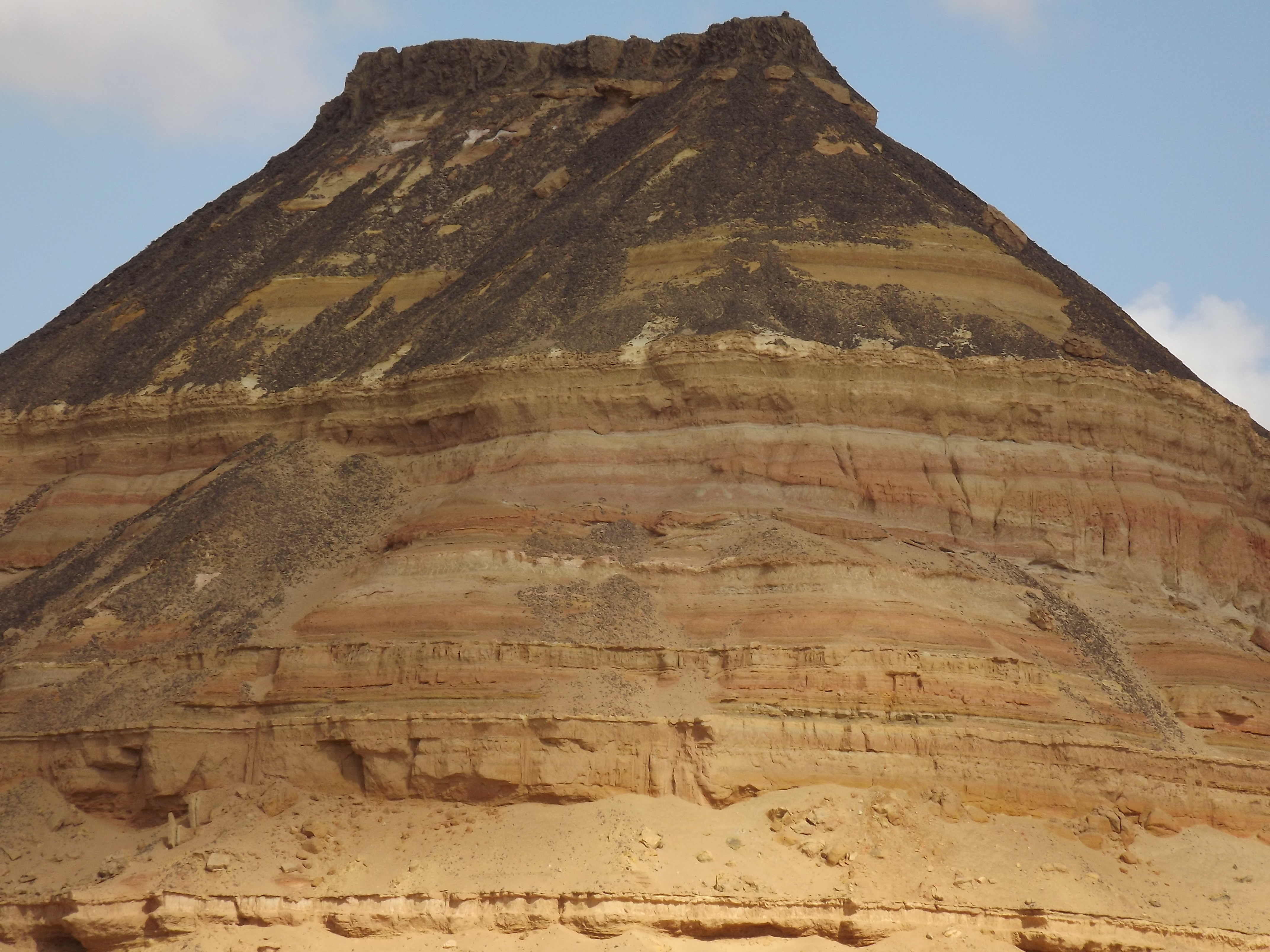 محمية قارون - الفيوم